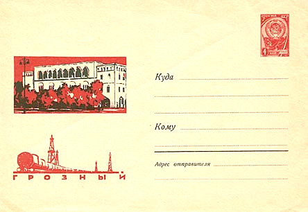 Конверт СССР